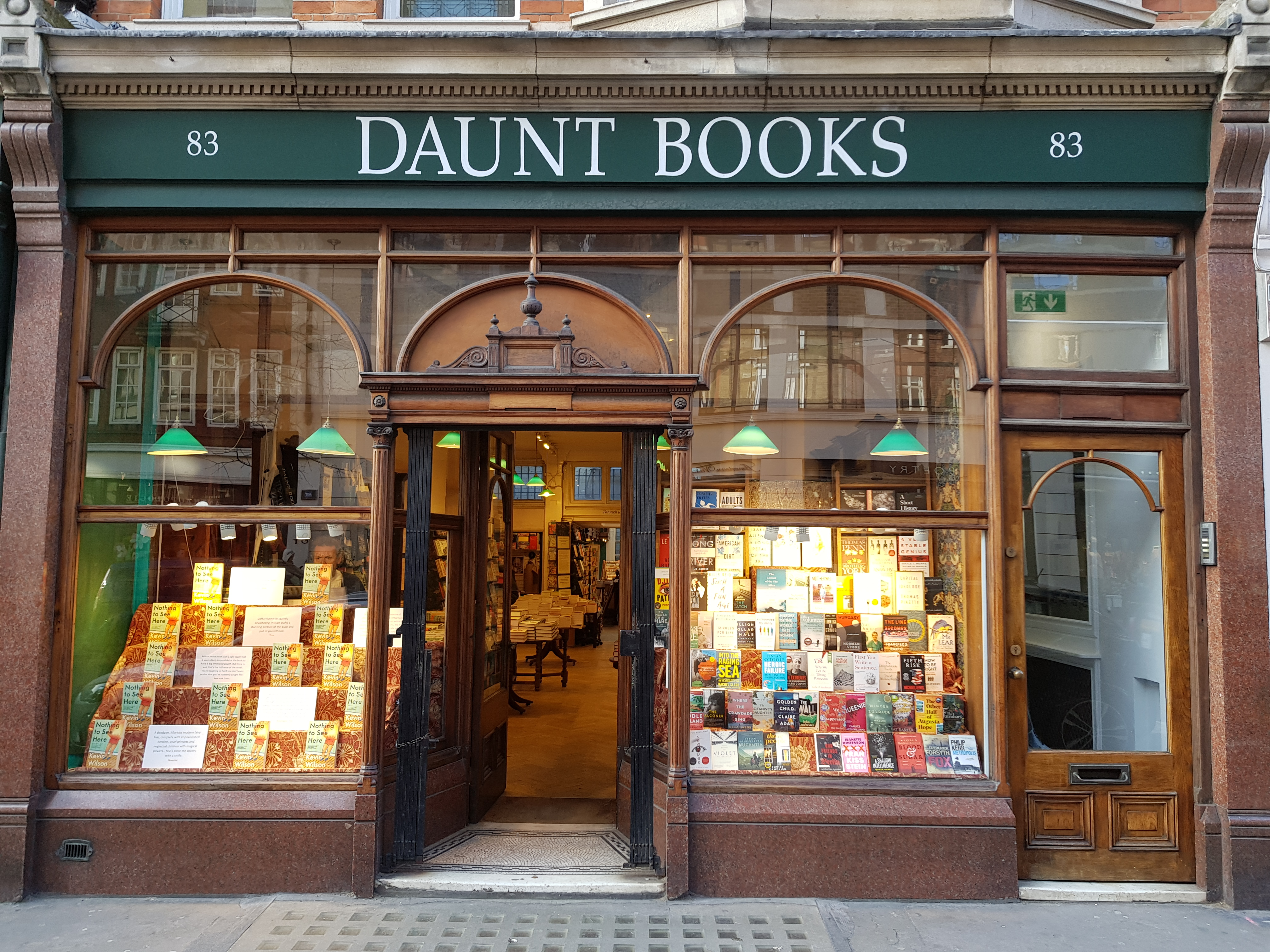 83, Marylebone High Street, Londres.